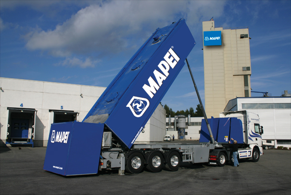 Henger for transport av ferdig sparkelmasse.